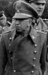 Antonio Sagardía Ramos, militar franquista español, visita la Alemania nazi en 1940.